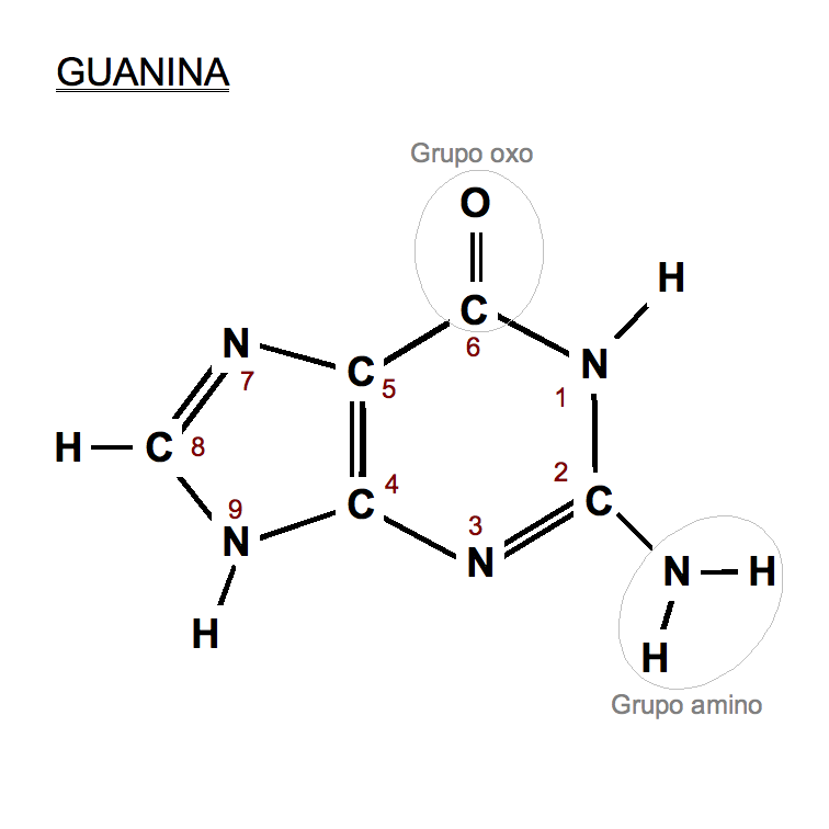 estructura química de la guanina